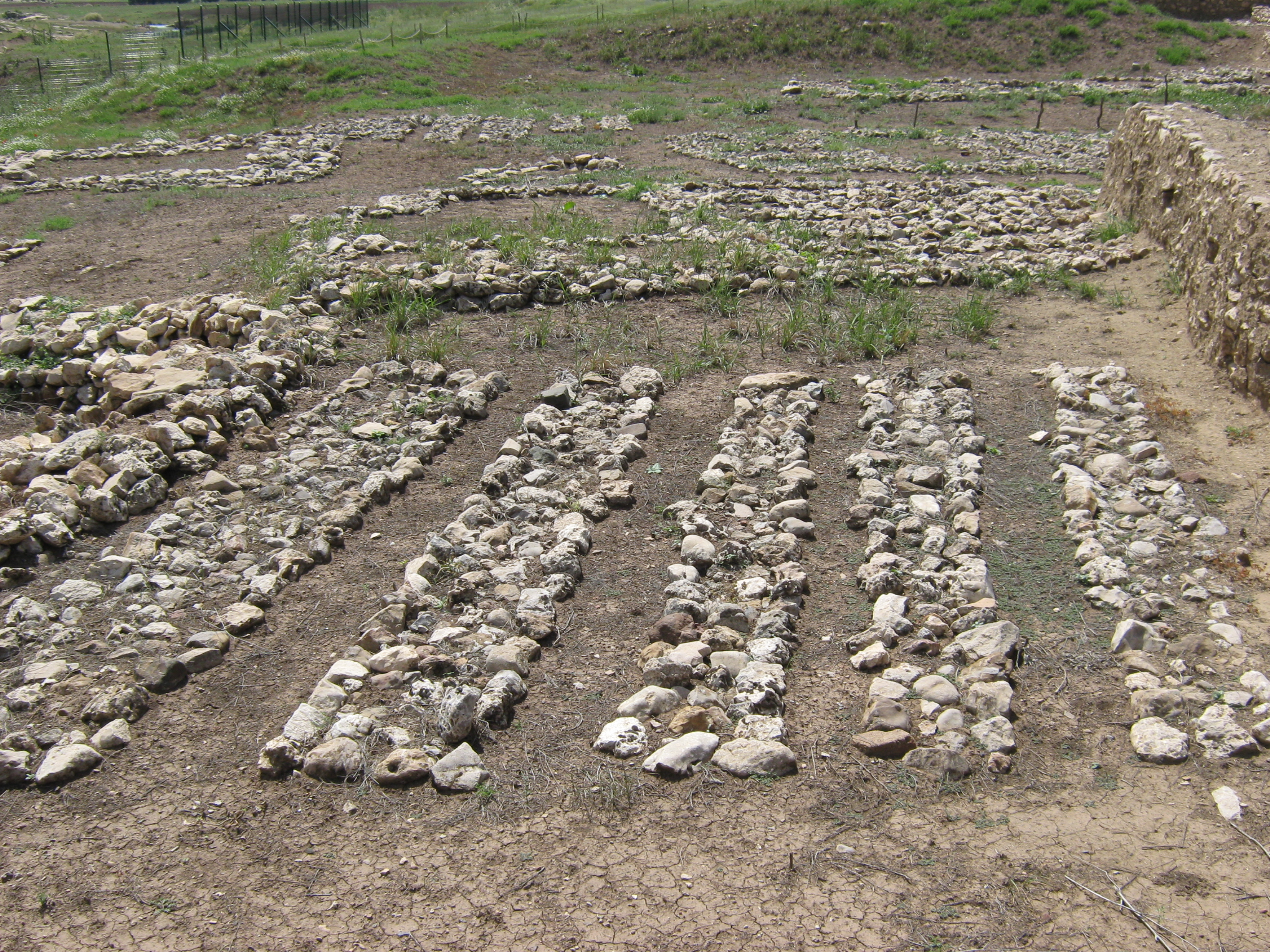 Ein Grillplan-Gebäude in Cayönü